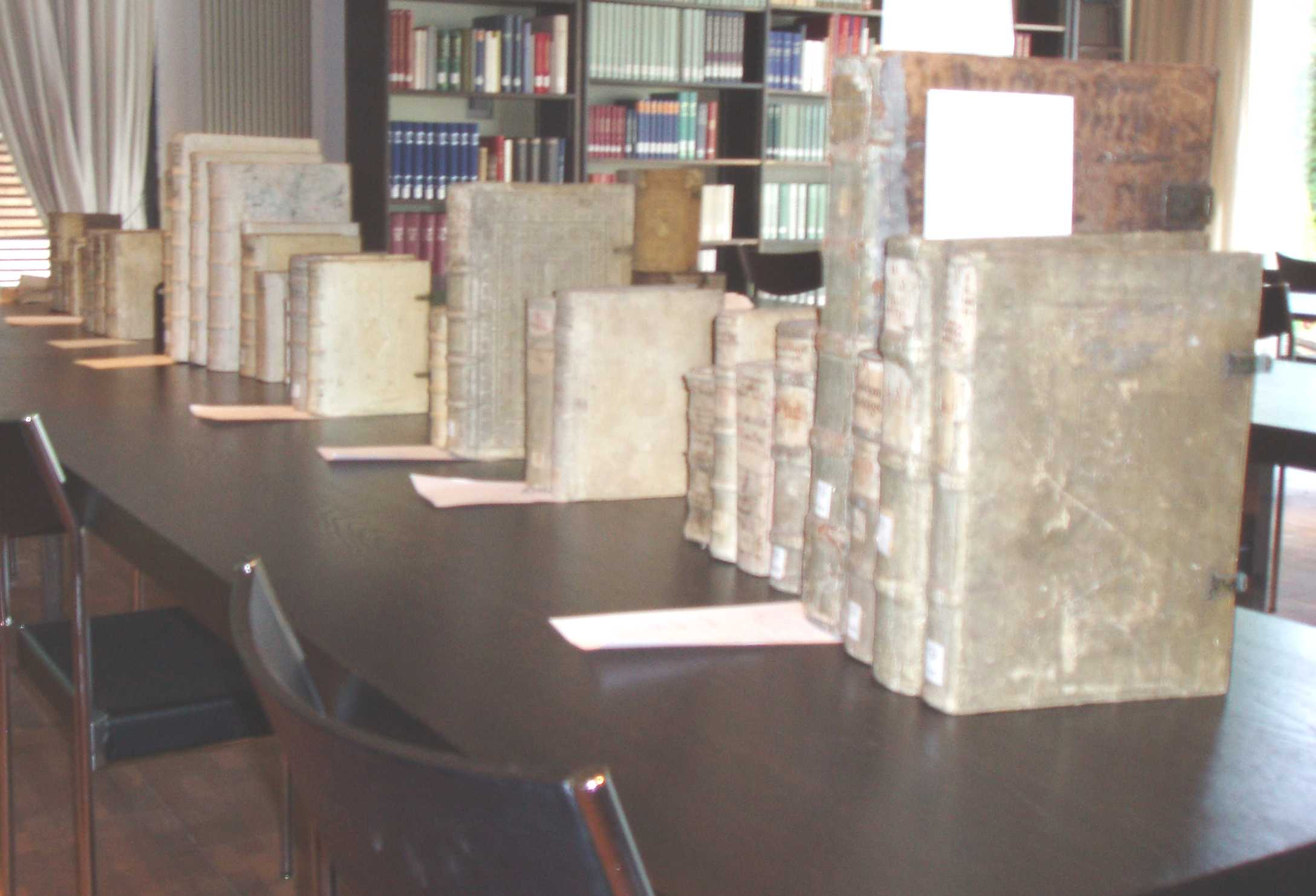 Bücher aus der ehemaligen Bibliothek der Augustiner-Chorherren in Eichstätt-Rebdorf in der Universitätsbibliothek Eichstätt-Ingolstadt